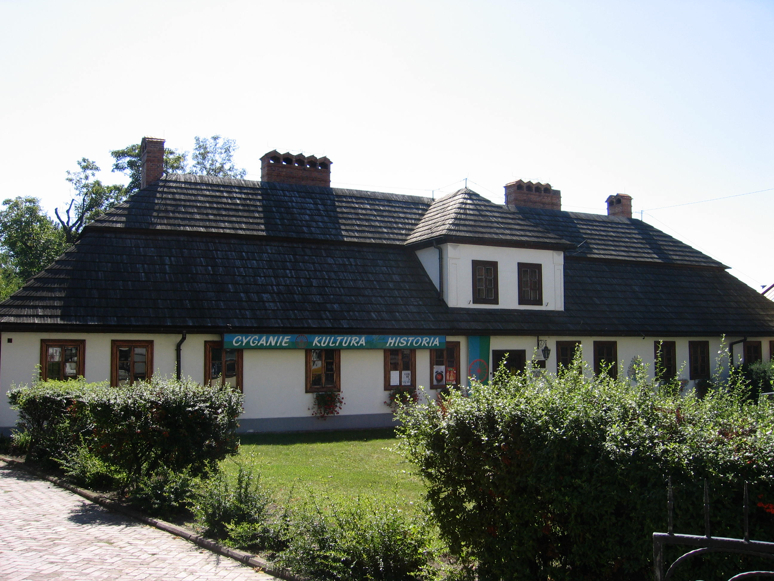 Tarnów, ul. Krakowska 10 - zespół dworku: dworek, obecnie Muzeum Etnograficzne z wystawą poświęconą kulturze i historii Cyganów} (zabytek nr A-221 z 17.08.1980)